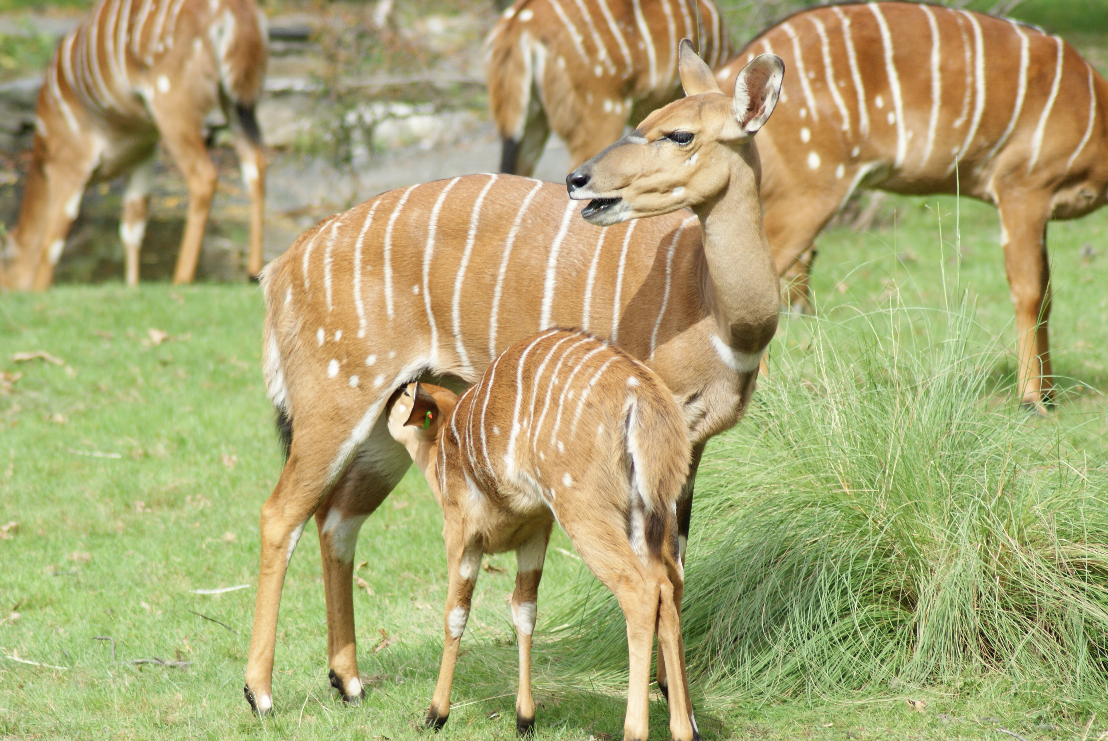 Nyala nursing